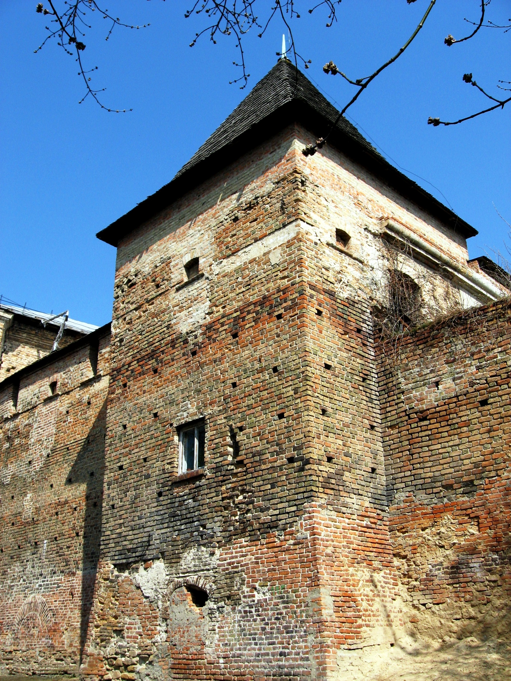 Луцьк. Вежа Чарторийських